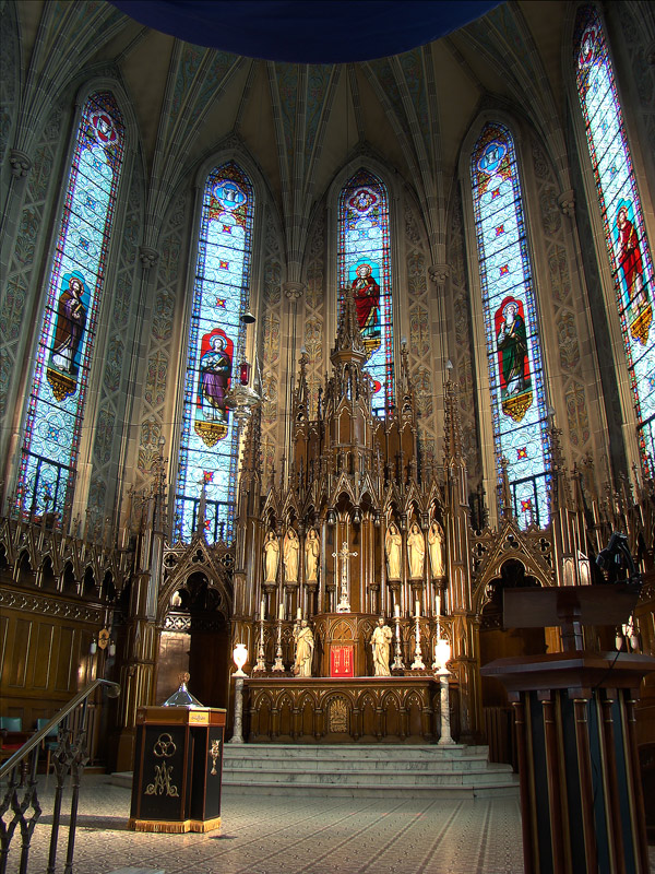 Église Saint-Pierre-Apôtre, Montréal, Québec, Canada.